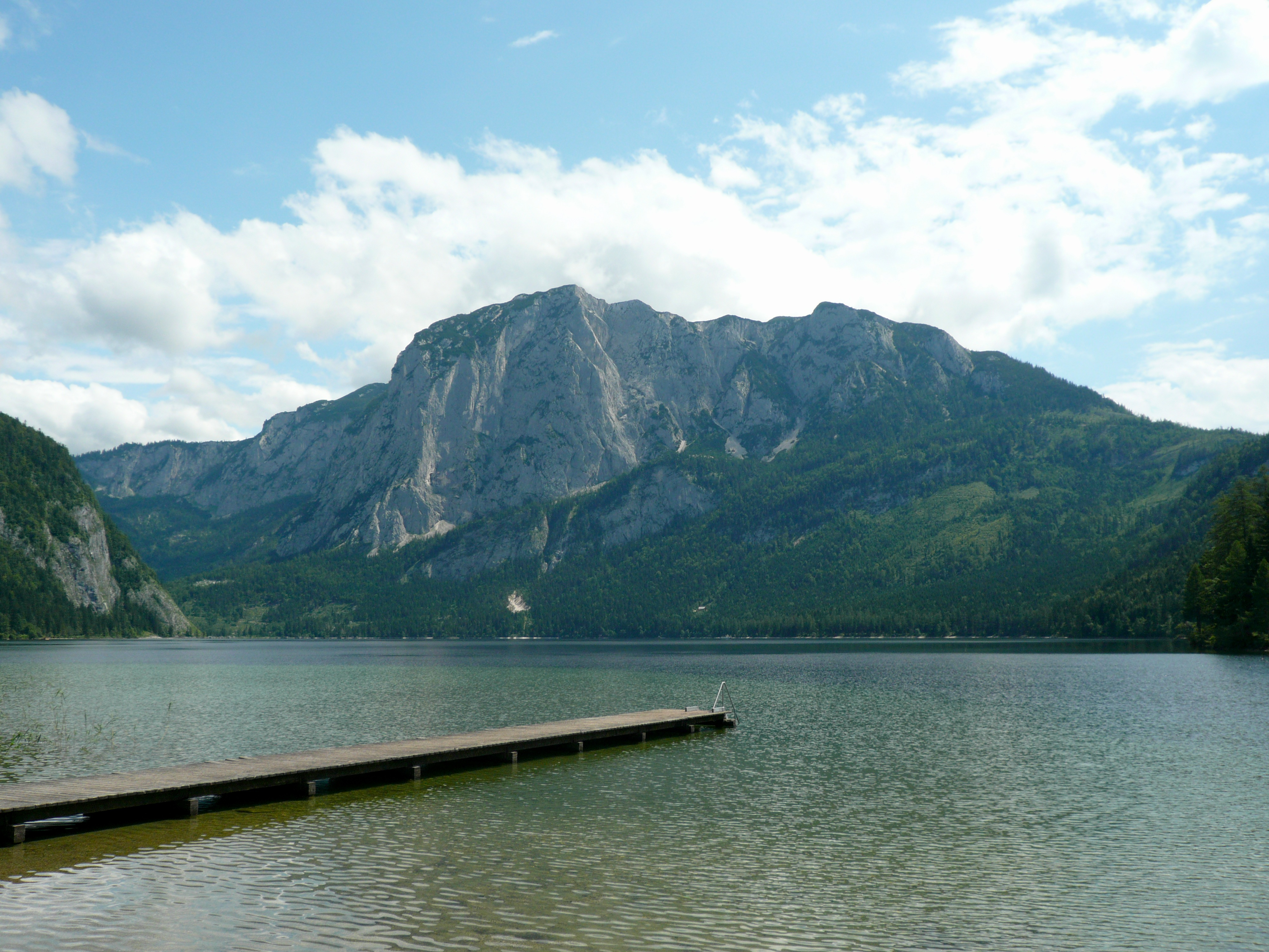 Altausseer See & Trisselwand, Austria